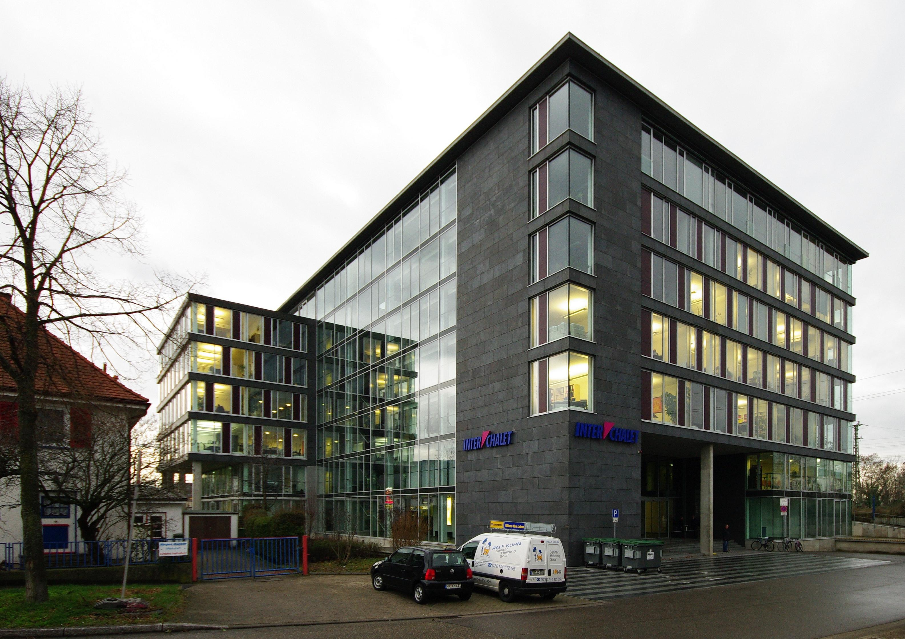 Das Verwaltungsgebäuder der Firma Inter Chalet